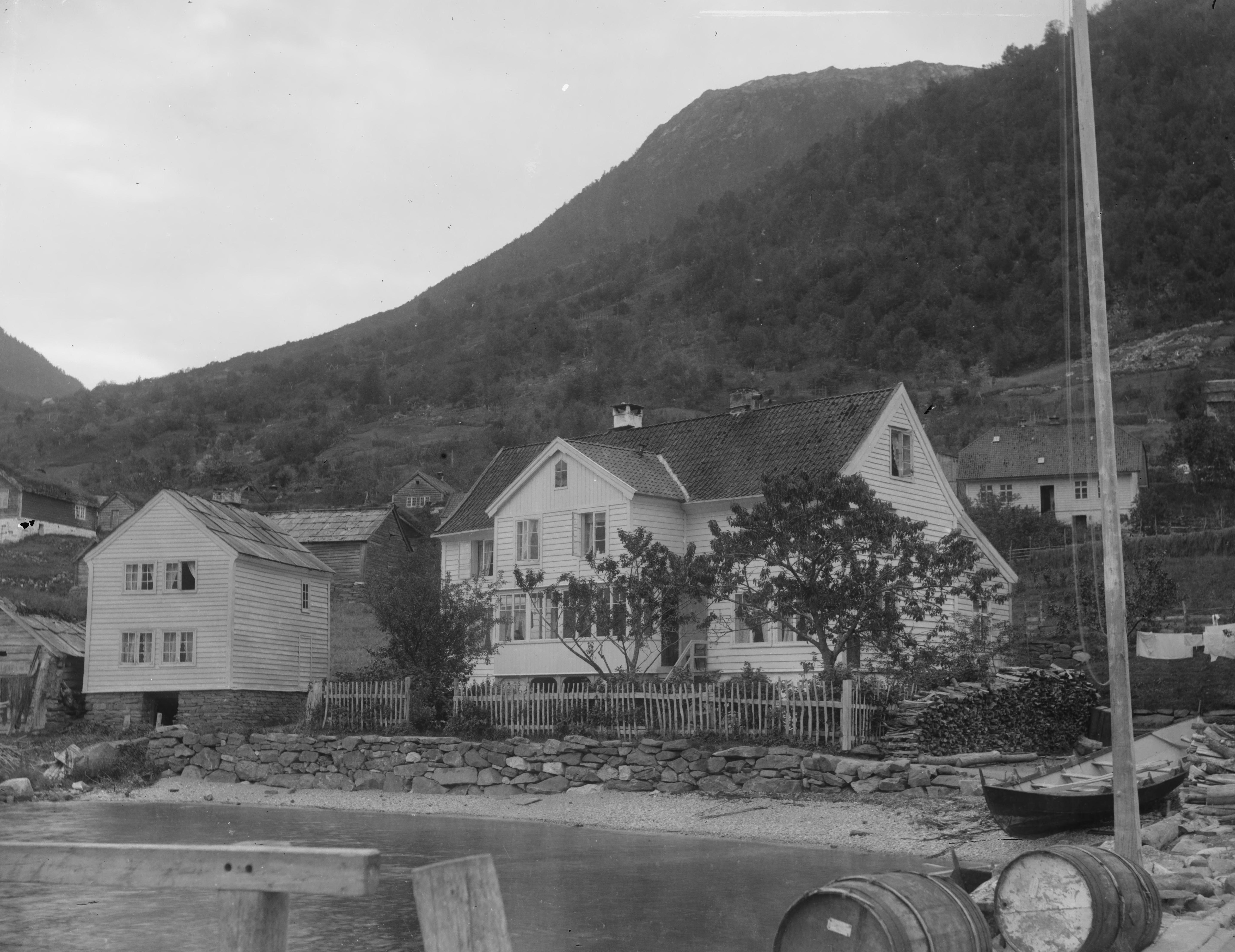 Skøiens katalog: Mor Utnes Hotel (Utne) Påskrift negativ: 381 [Uleselig tekst] Hotel, Hardanger. Skøien Christiania Påskrift negativ: 276 Odda [Riksantikvaren] Påskrift konvolutt: B-276 Utne Utnes hotel [Riksantikvaren] Sted: Utne Kommune: Ullensvang Fylke: Hordaland Tagger: hotell Utne hotel fasade